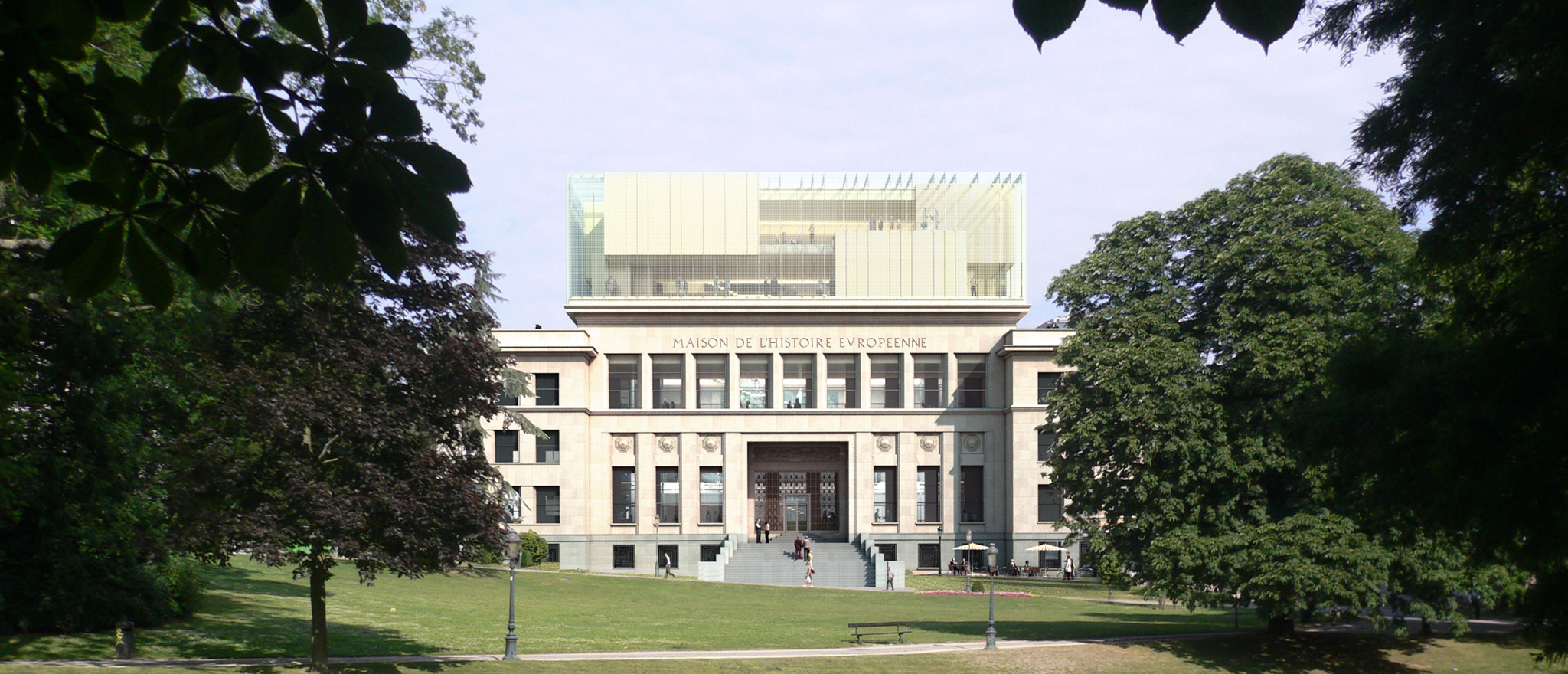 Visualisierung "Haus der Europäischen Geschichte, Brüssel", Wettbewerb 2011